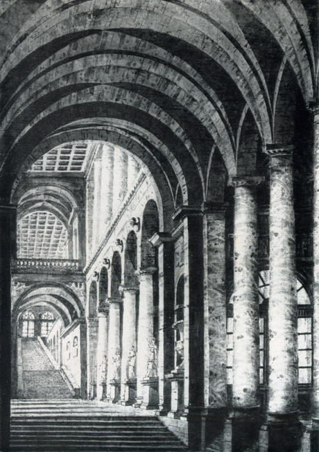 Галеря Гонзага: ескіз фрески